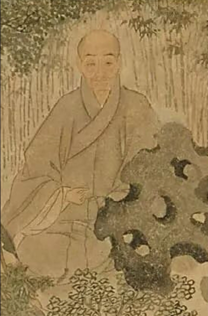 蓮池袾宏（1535年－1615年），俗姓沈，法名袾宏，字佛慧，法號蓮池，故常稱為蓮池大師，又因常在雲棲寺居住而稱為雲棲蓮池，浙江仁和（今杭州市）人，中國佛教淨土宗的第八代祖師，與紫柏真可、憨山德清、蕅益智旭等並稱明末四大高僧。